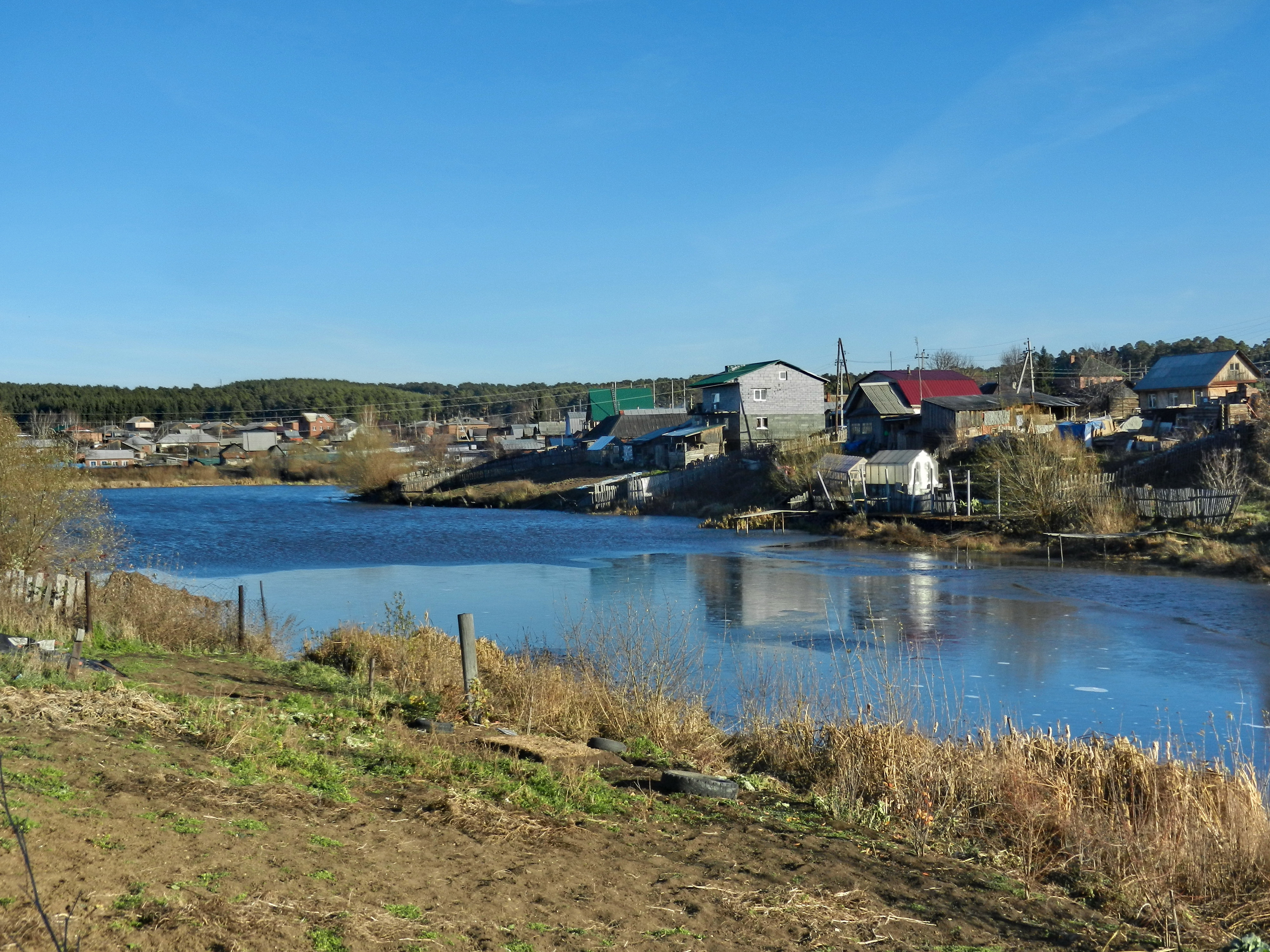 Горный Щит